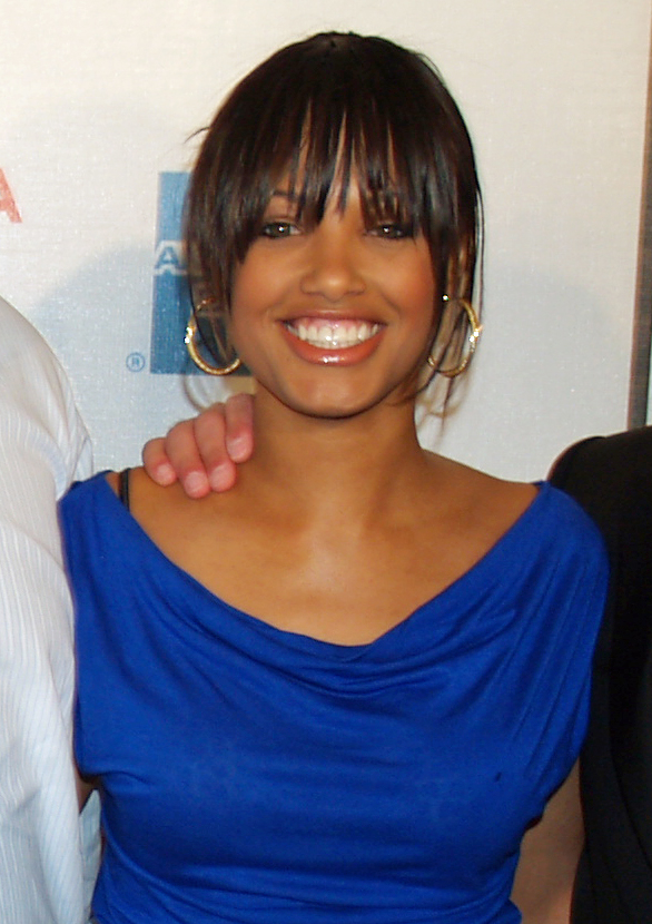 K. D. Aubert